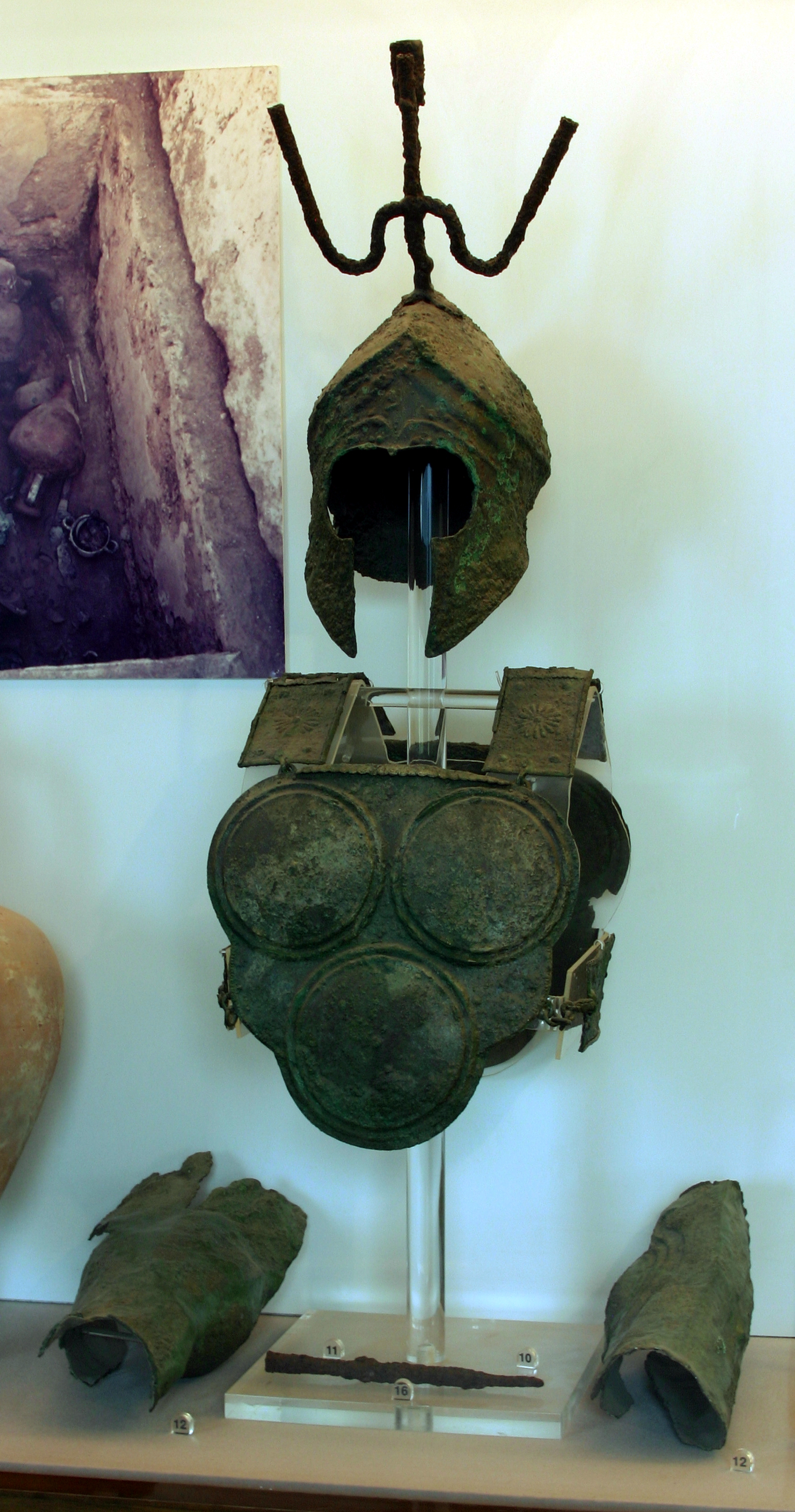 Museo archeologico nazionale - Paestum